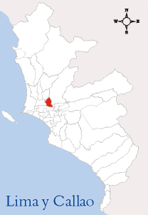 Localización del Distrito del Rímac Imagen elaborada por --Edgardo Reyes 22:02 9 mar, 2005 (CET) Categoría:Mapas del Perú (imagen)